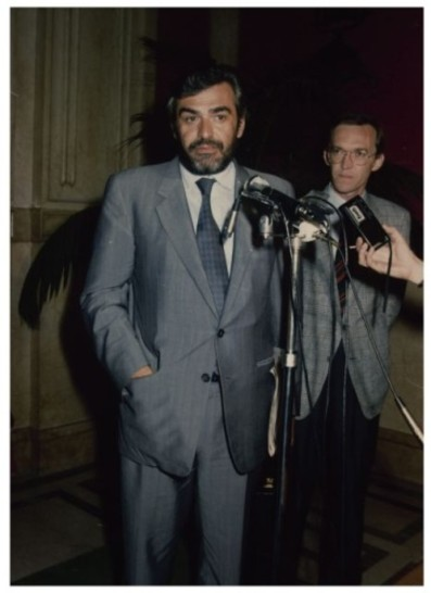 Consultazione formazione nuovo Governo